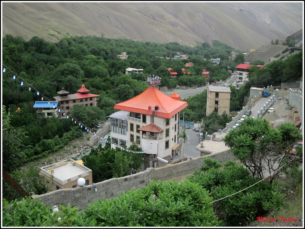 'Marino' Restaurant in 'Suleqan' مارینو در سولقان